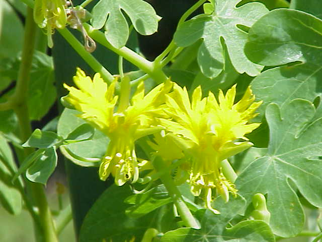 Species: Tropaeolum peregrinum (var. peregrinum) Family: Tropaeolaceae Image No. 1